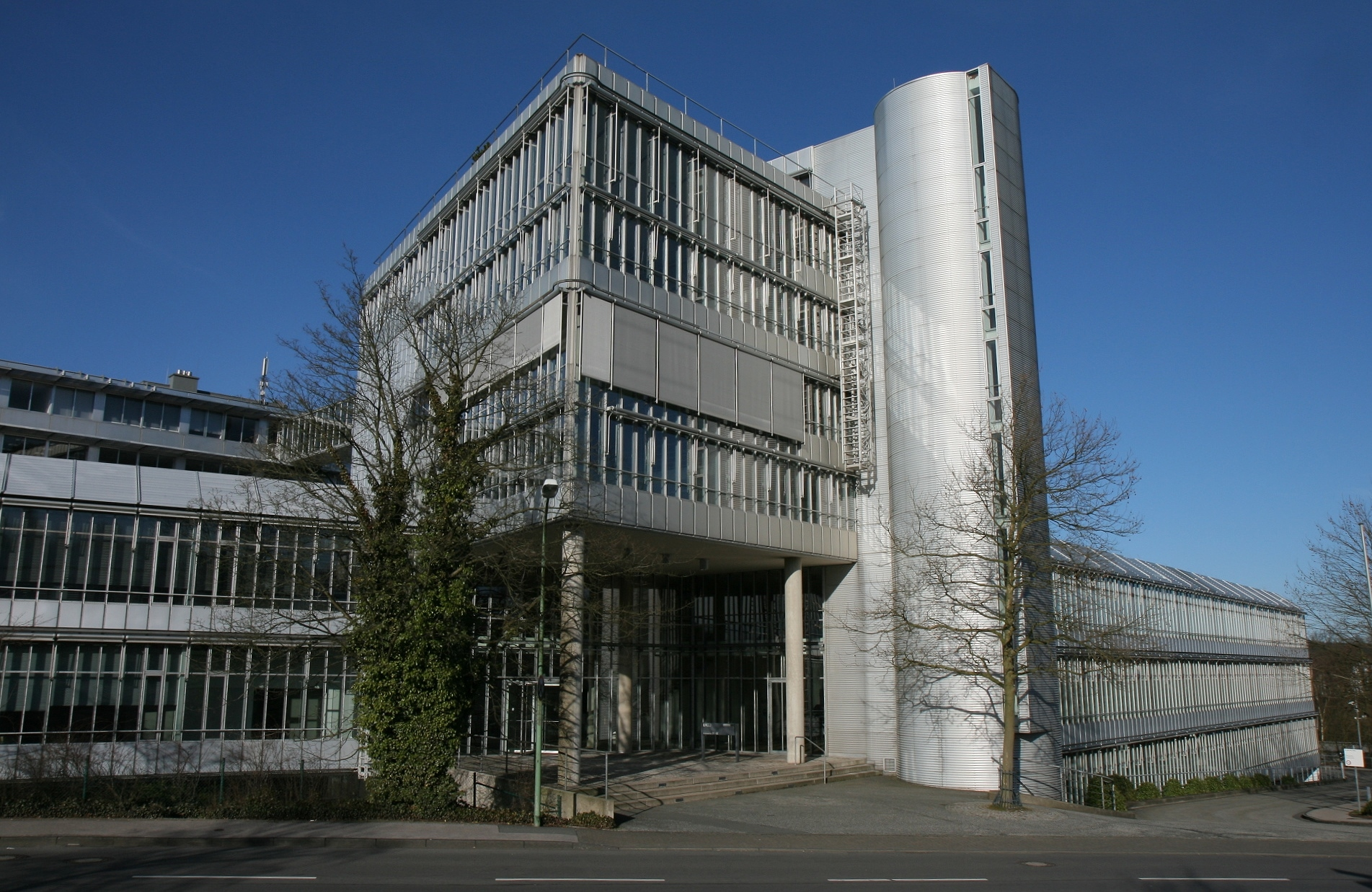 Gebäude der Firma ERCO in Lüdenscheid, Brockhauser Weg 80-82